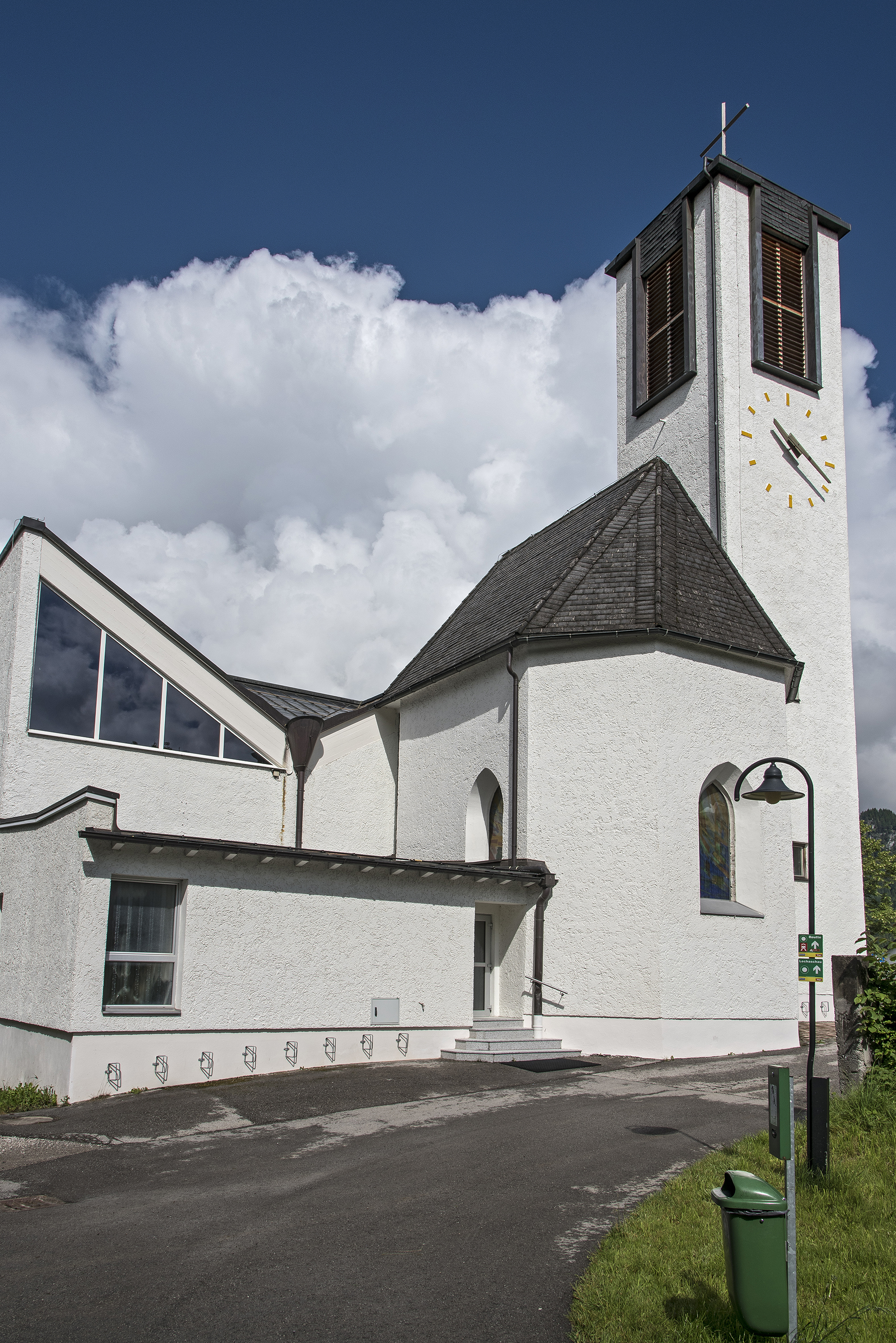 Kath. Pfarrkirche hl. Geist